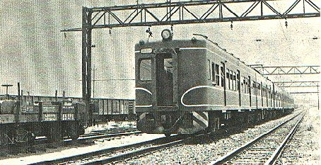 Trem Kawasaki-Toshiba modificado pela Fepasa, no pátio Barra Funda (atual Memorial da América Latina).